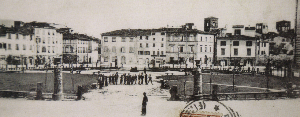 Il prato di san francesco, pistoia, in una cartolina del 1910